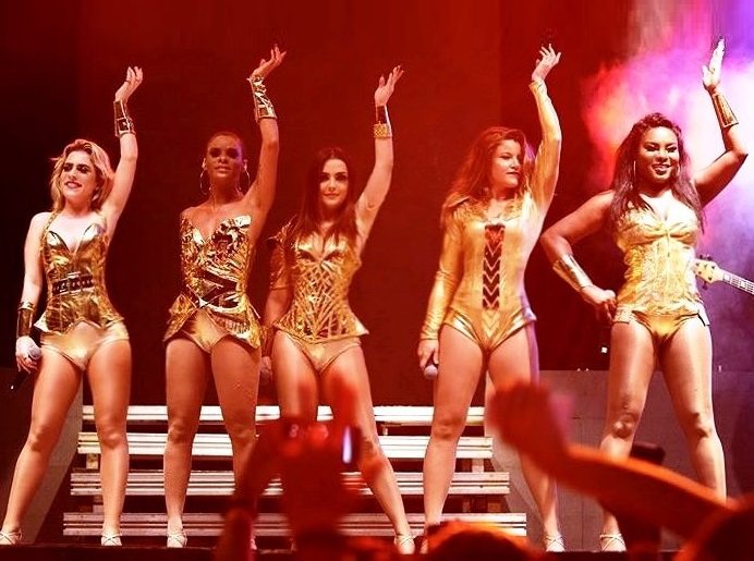 Rouge durante show em Vila Velha, em 2018.